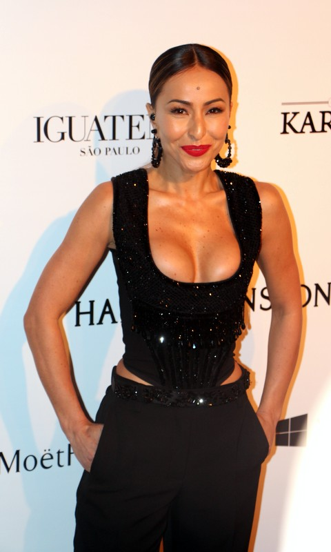 23 - Sabrina Sato-003